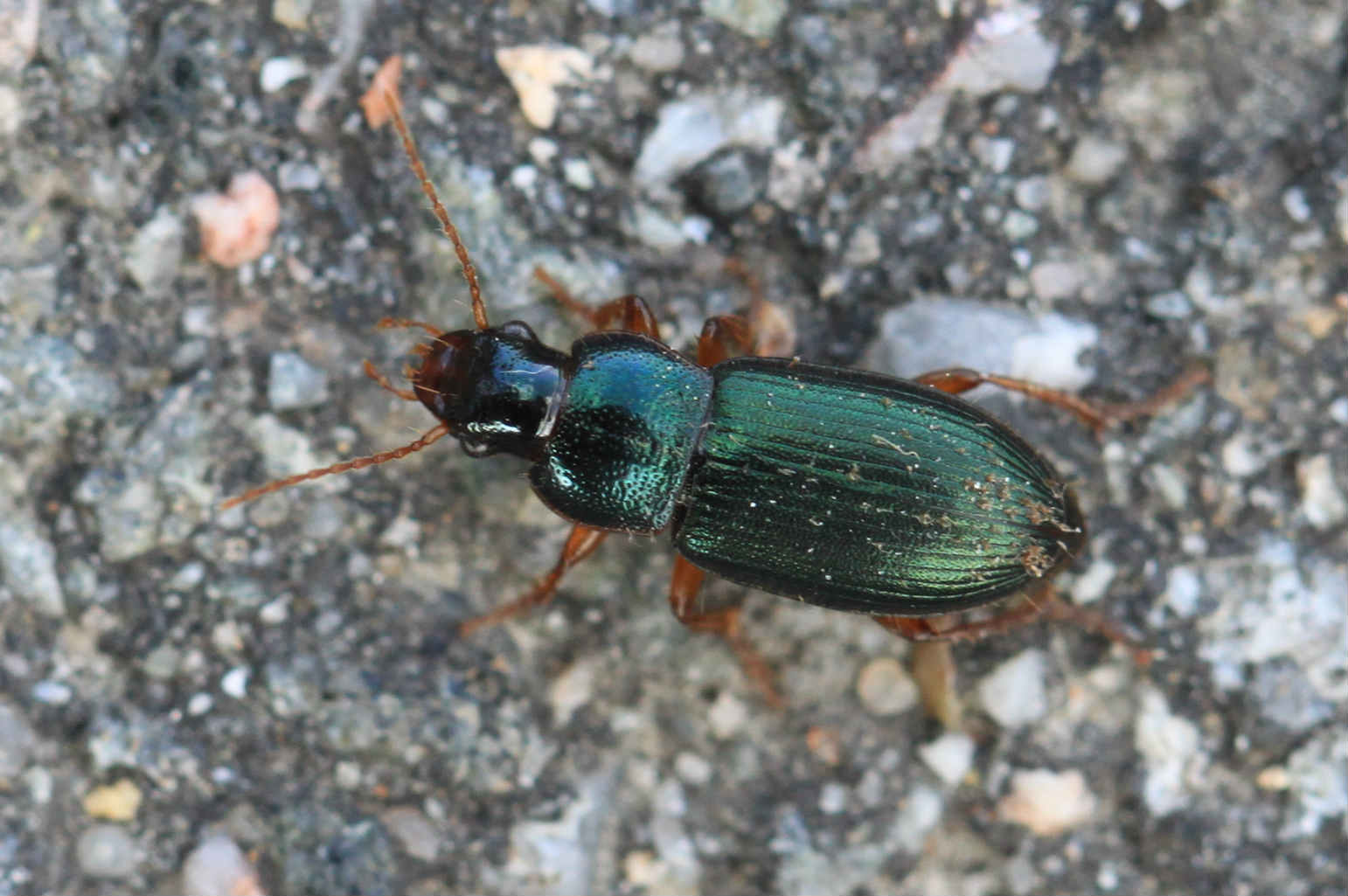 Ophonus azureus am 29.3.2017 in Walldorf/Baden